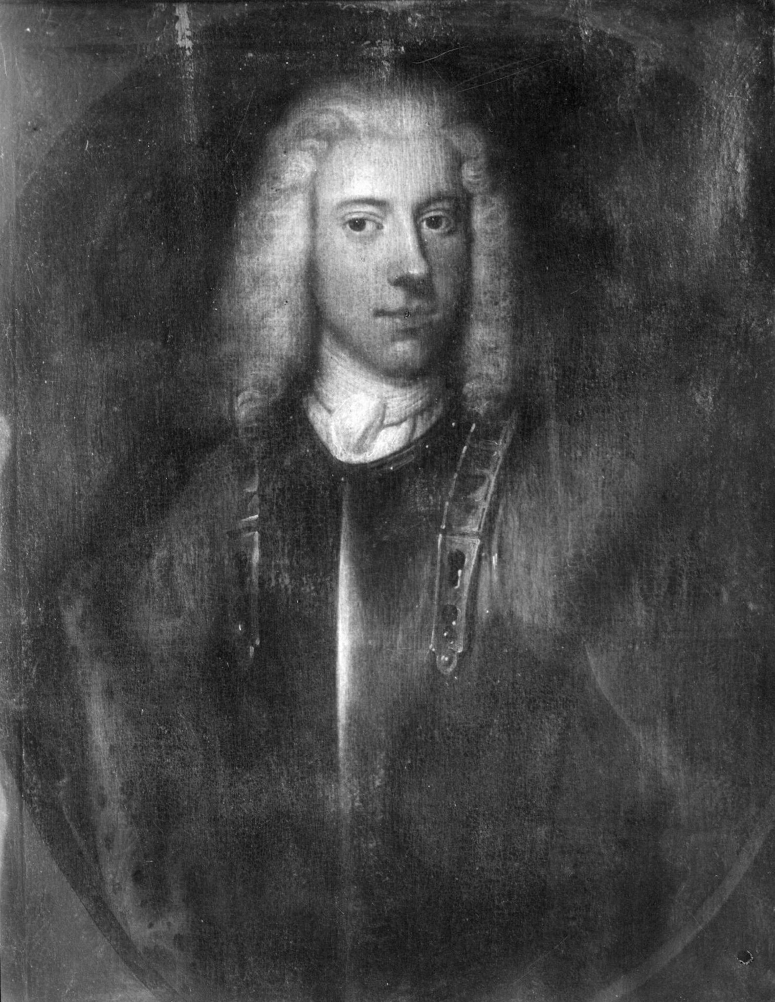 Gregorius (II) Ziegler (død 1700) - leiesoldat og offiser i Dansk-norsk tjeneste som oberstløytnant og kommandant på Krempe festning (1683), og senere som visekommandant i Glückstadt (1691).